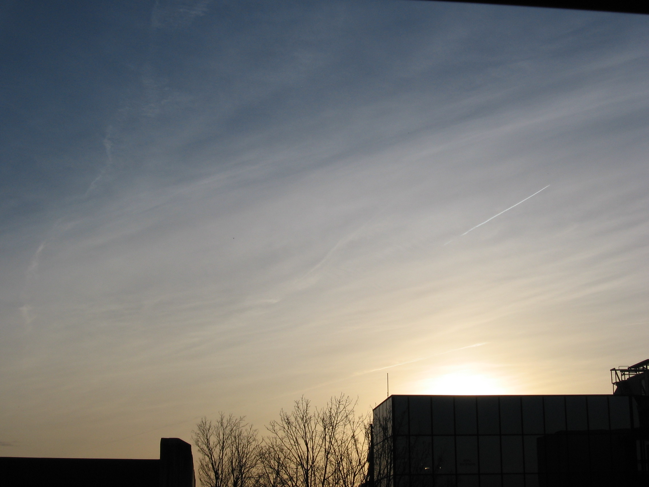 Cirrostratus, photo prise au soleil couchant dans la région de Toulouse.